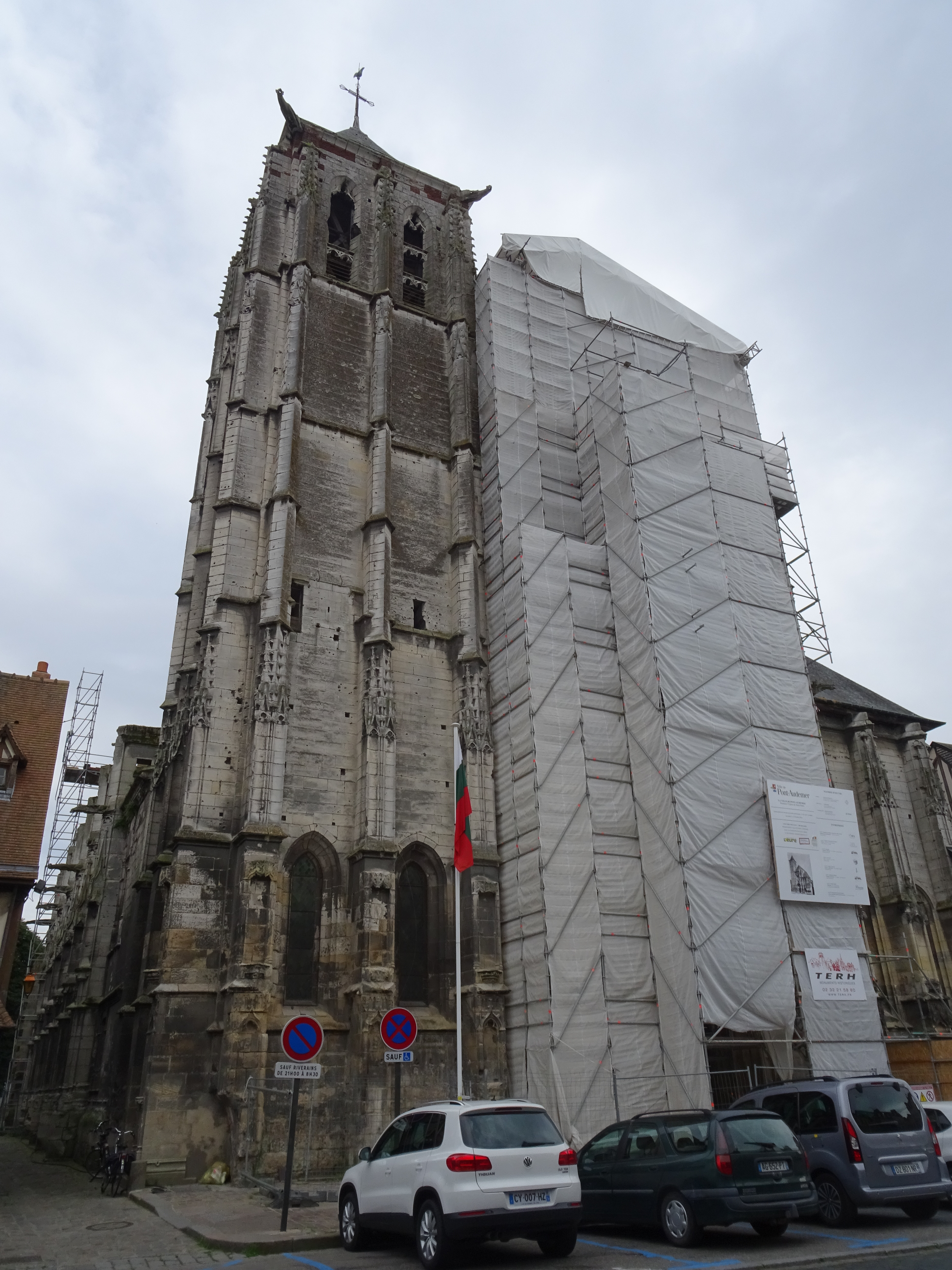 Bâches protectrices des échaffaudages et de l'édifice posées pendant la période de travaux.